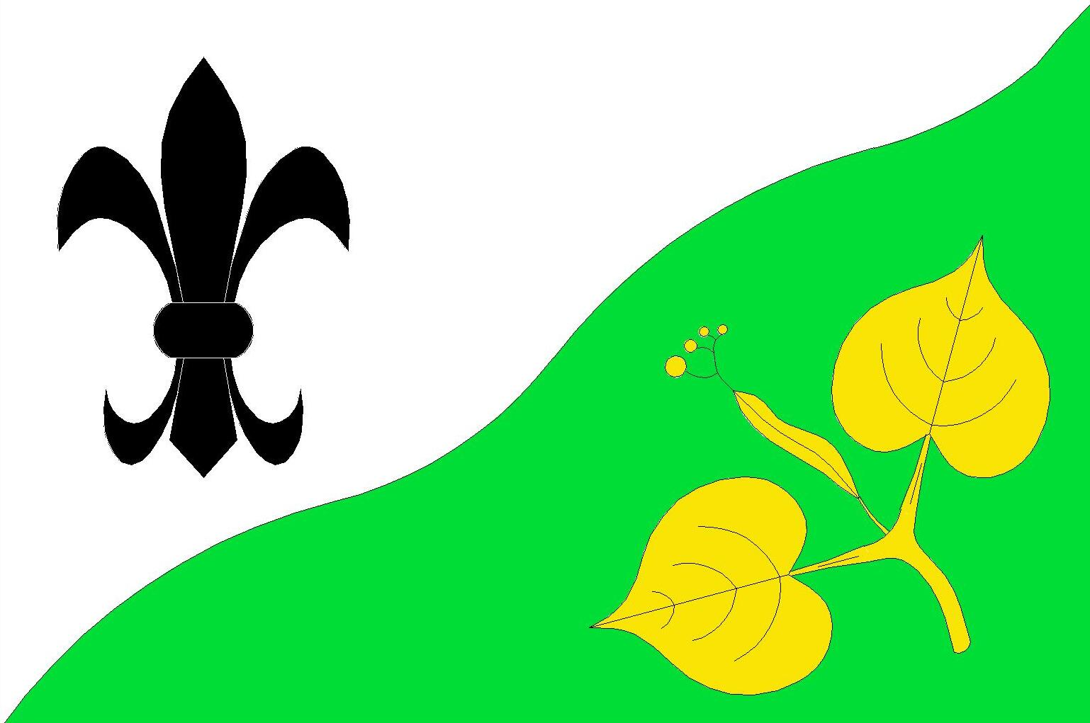 Vlajka Obce Chlumec, okr. Český Krumlov